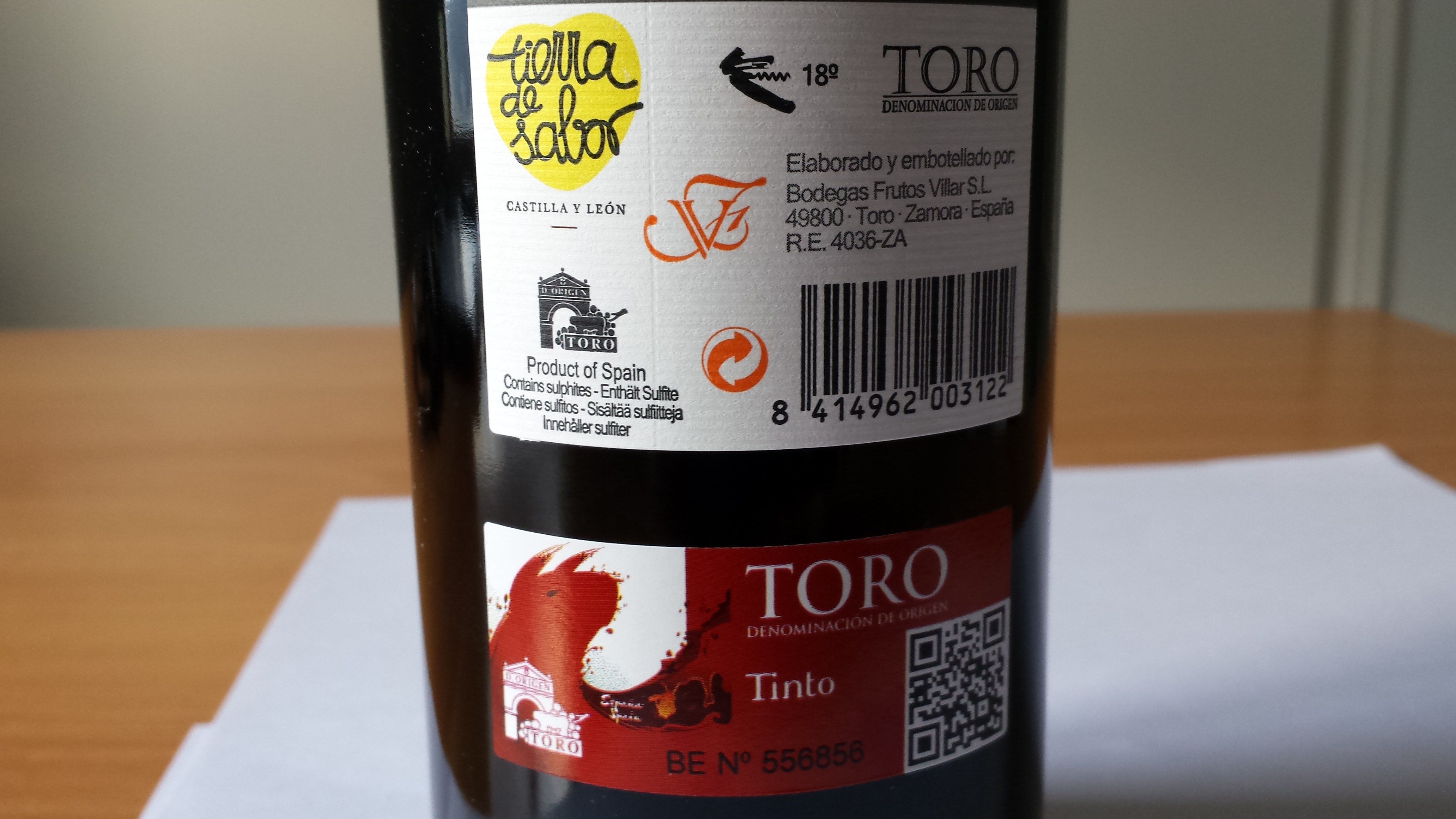 Etiqueta de vino de la DO Toro, Zamora, Castilla y León, España.